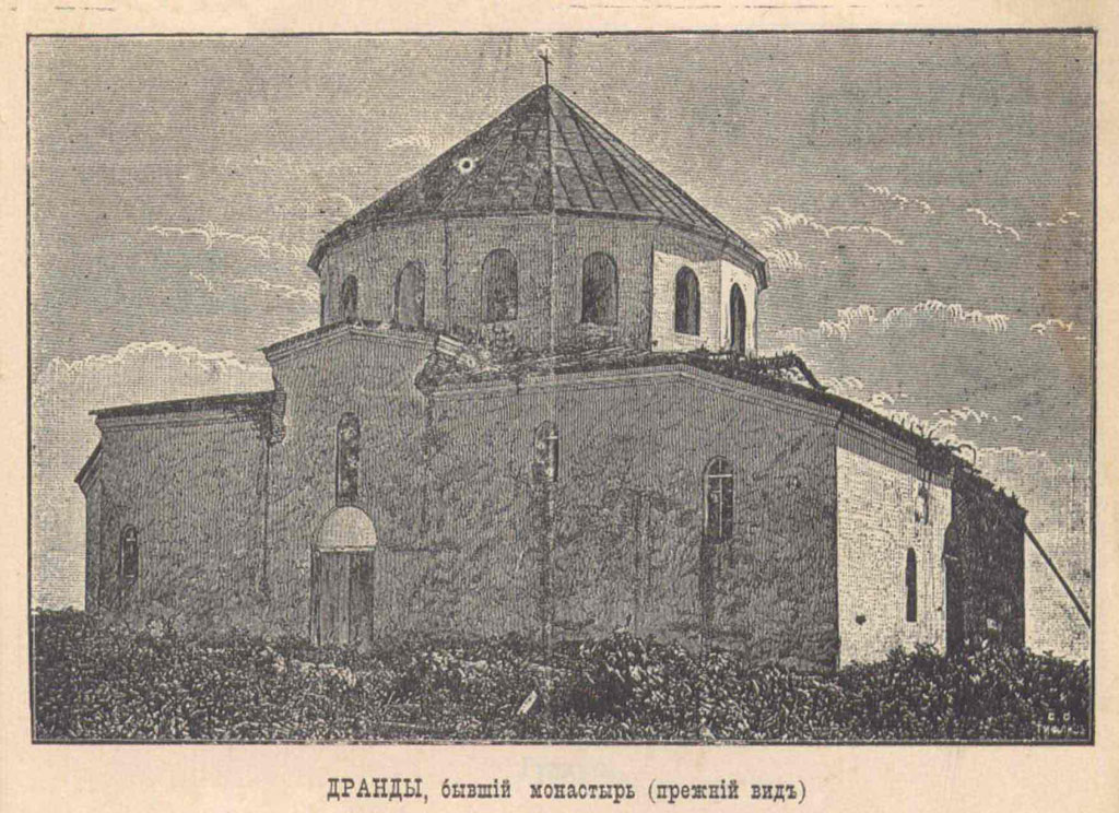 Собор Драндского монастыря